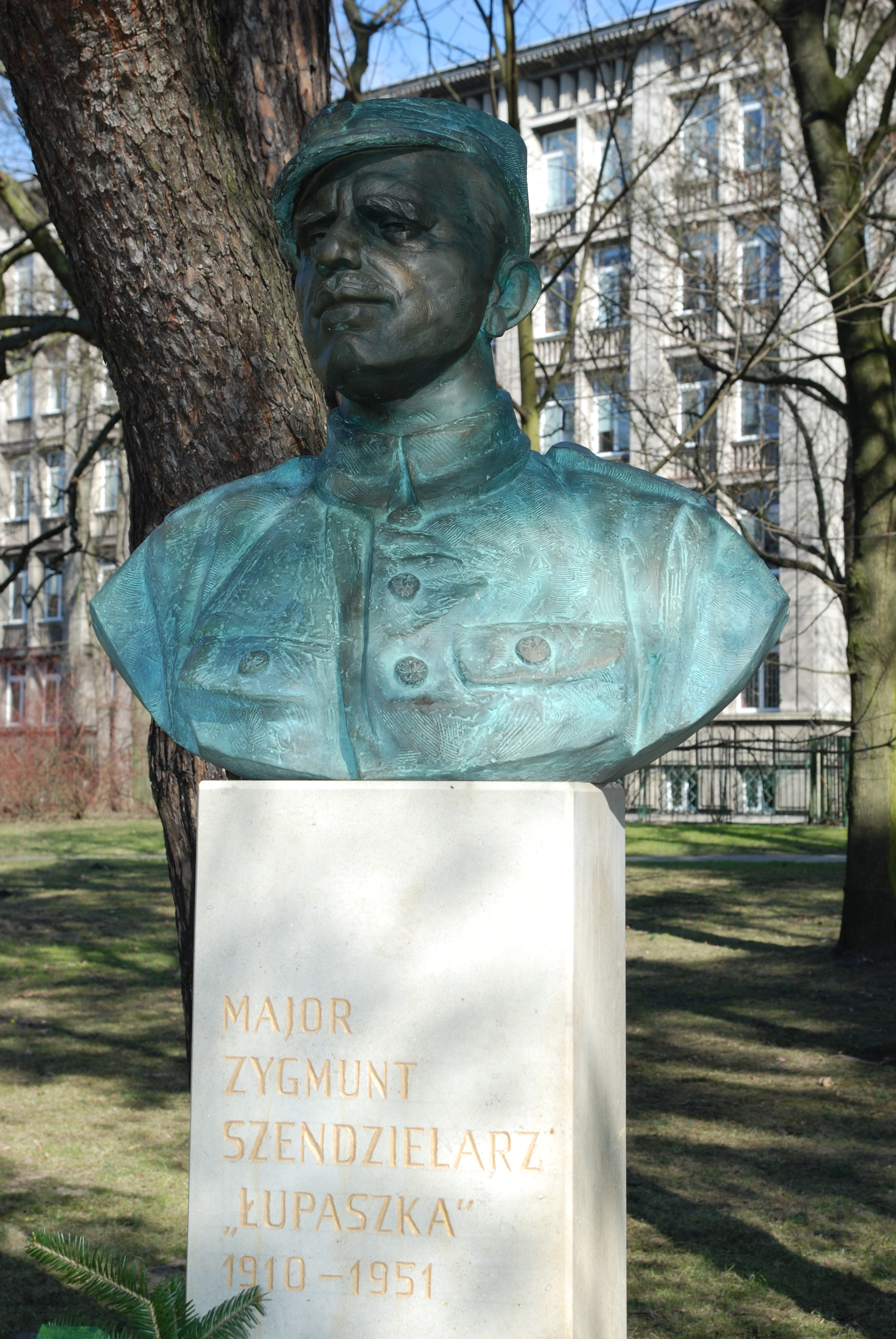 Pomnik mjr Zygmunta Szendzielarza ps. "Łupaszka" w Parku Jordana w Warszawie